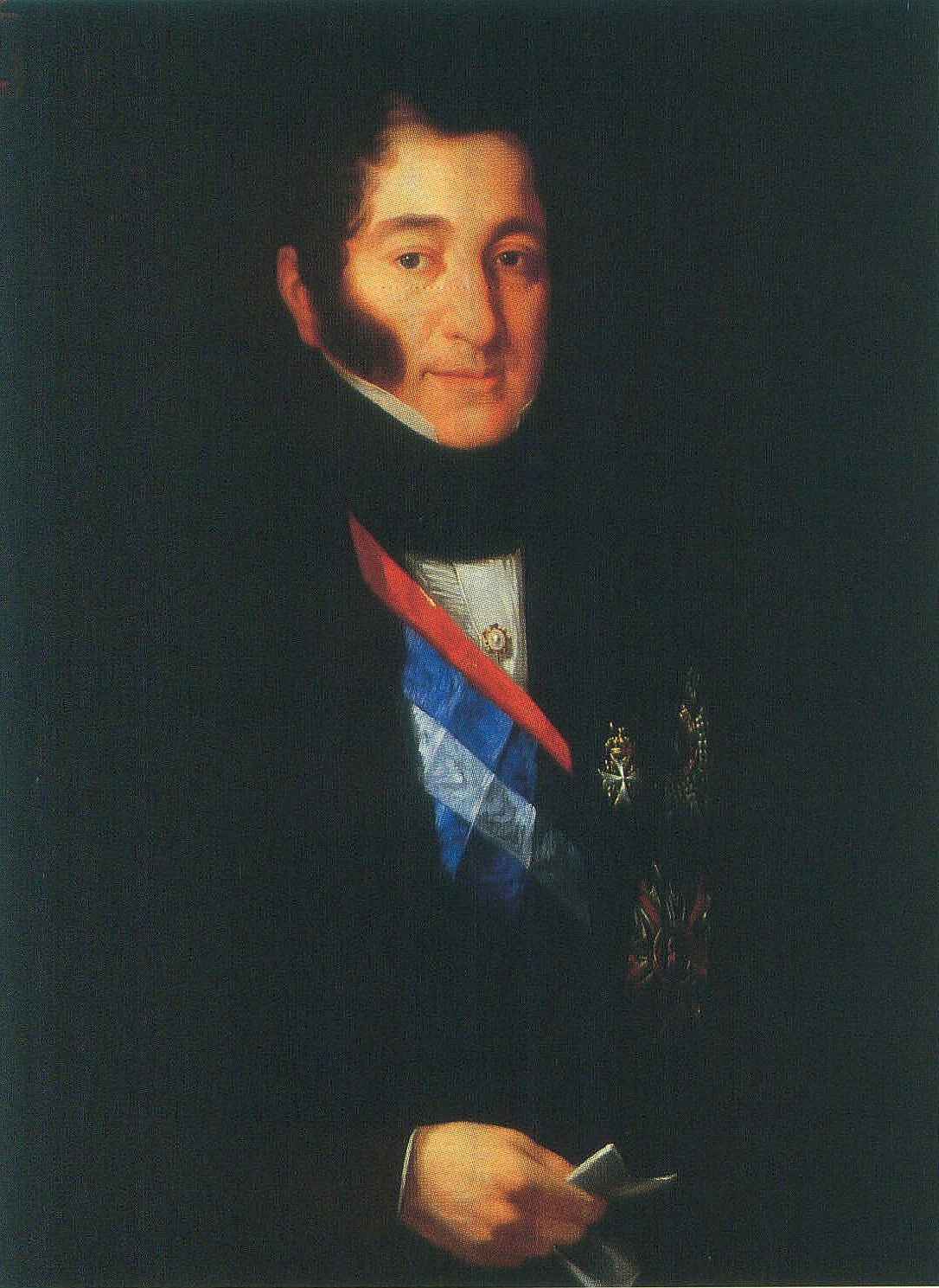 Retrato del aristócrata y político español José María Moscoso de Altamira (1788-1855), primer conde de Fontao. Durante el reinado de Isabel II de España llegó a ser ministro de Gobernación de la Península y de Fomento General del Reino y también presidente de las Cortes y primer presidente del Senado.